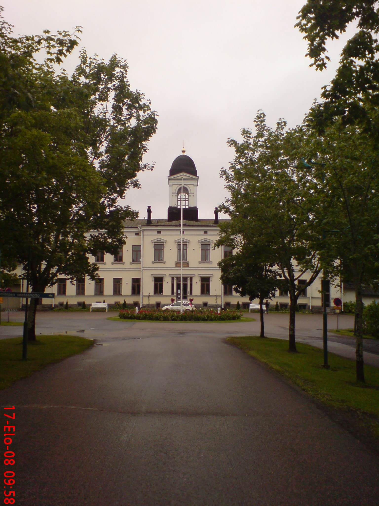 Pitkäniemi